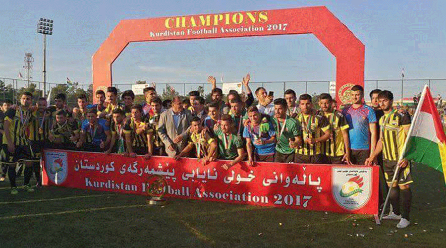 کوردی: یاریزانانی یانەی پێشمەرگەی هەولێر لە دوای بوون بە پاڵەوانیان لە خولەکە 2017/4/21